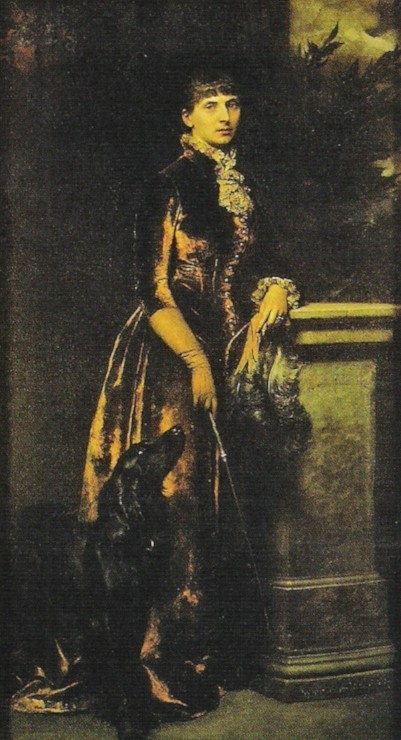 Baronin Friederike Marie Helene von Reitzenstein (1853–1944)